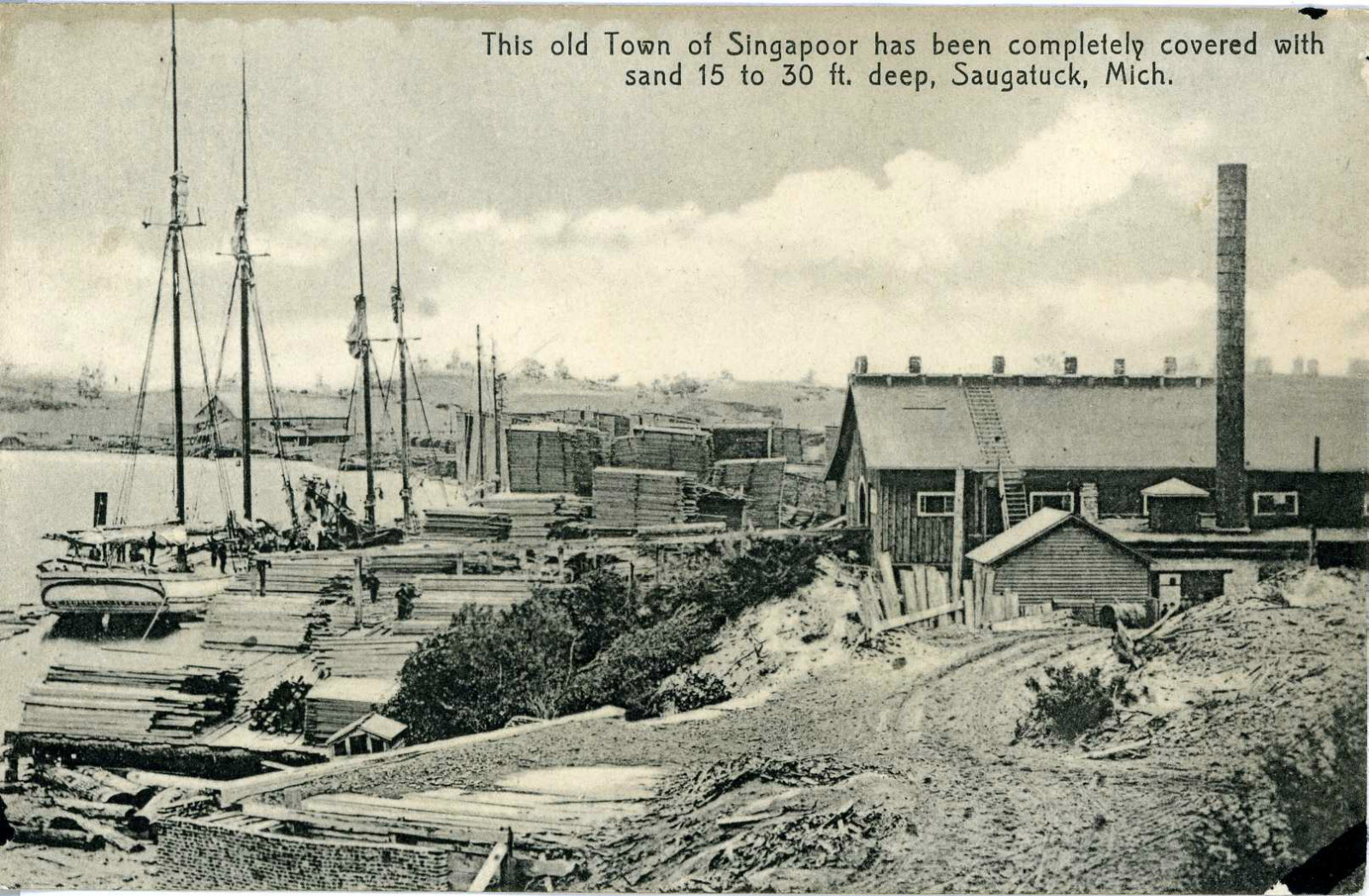 Singapoor (Singapore) buried village -- Saugatuck, Michigan.